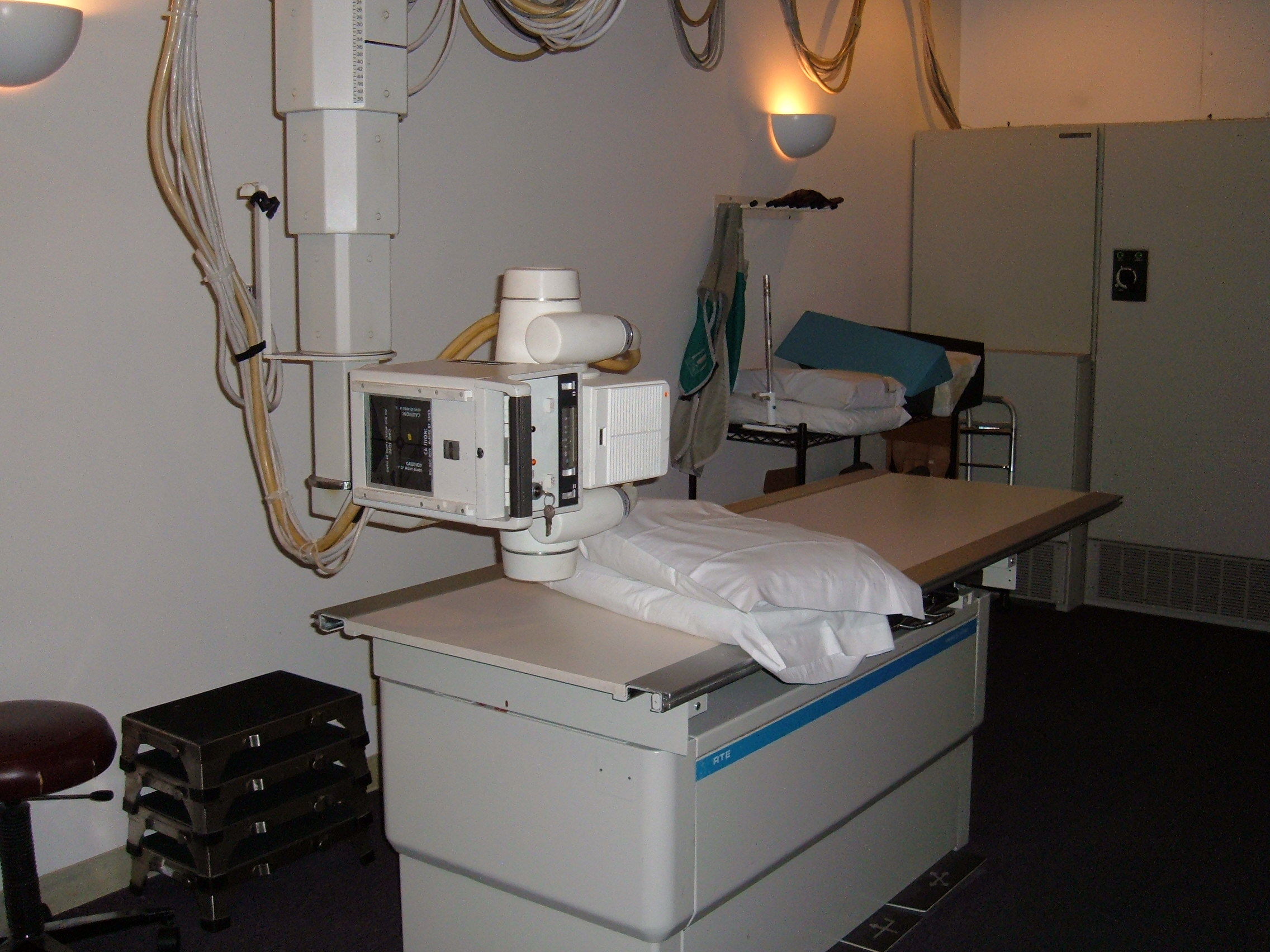 X-ray table